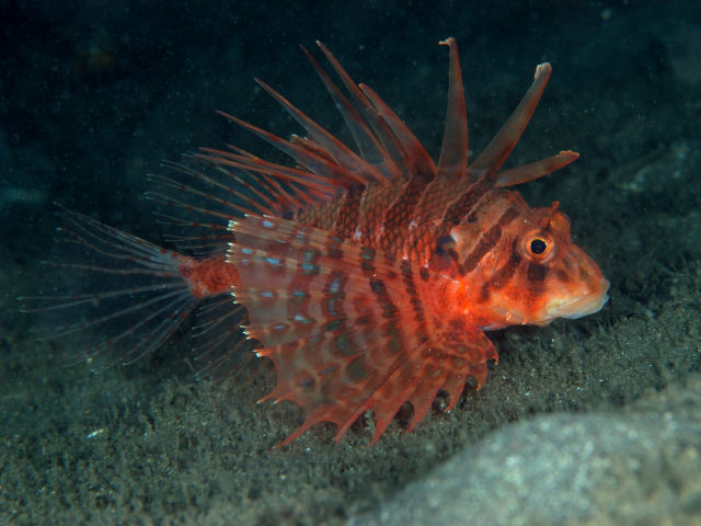 エボシカサゴ Ebosia bleekeri